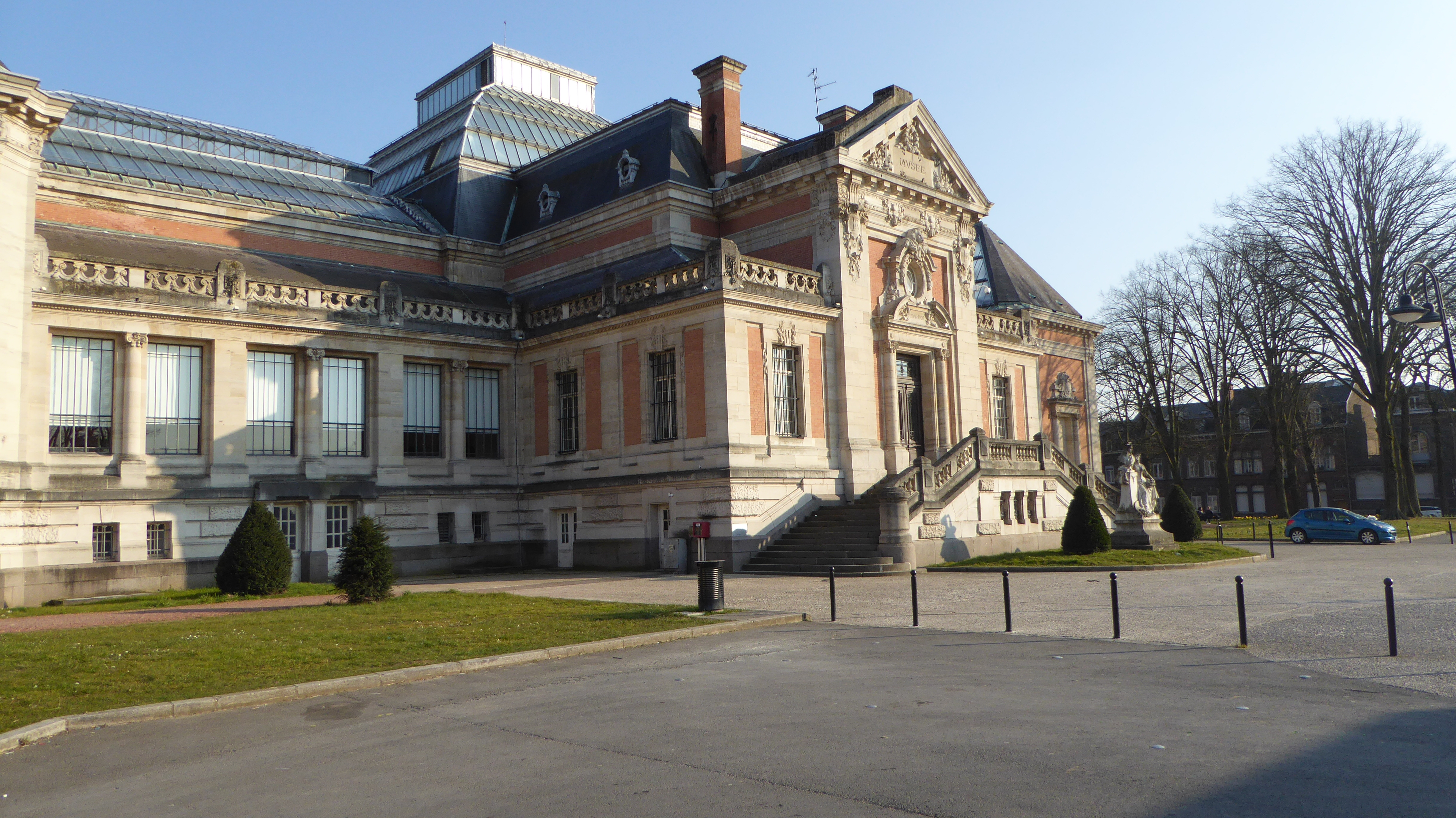 Valenciennes le musée des Beaux-Arts. Nord (département français).